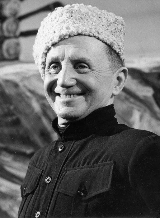 Изображение Дирижёра хора донских казаков